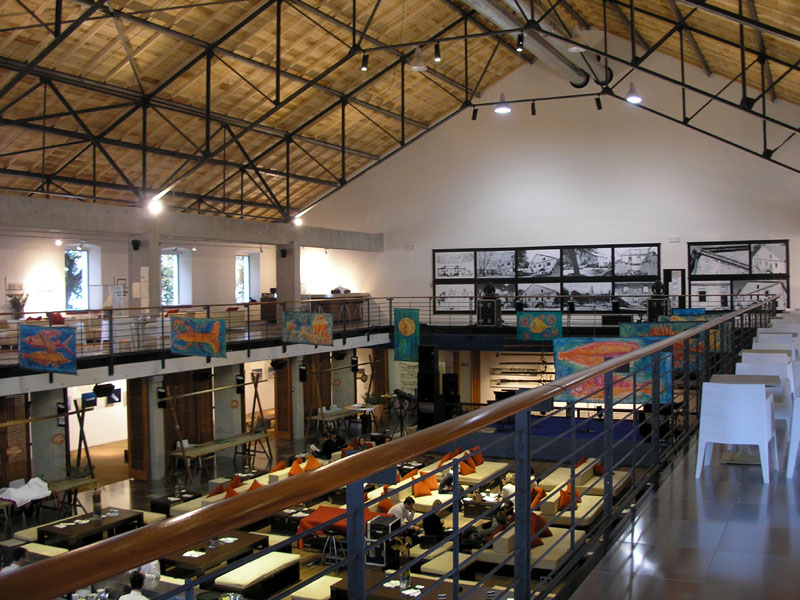 Arsenal, Zadar